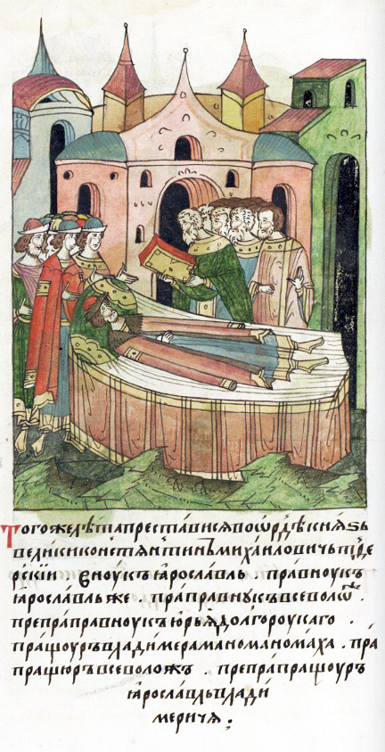 ЛИЦЕВОЙ ЛЕТОПИСНЫЙ СВОД В том же году преставился в Орде великий князь Константин Михайлович Тверской, внук Ярославов, правнук Ярославов, праправнук Всеволодов, препраправнук Юрия Долгорукого, потомок пращура Владимира Манамаха, прапращура Всеволода, препрапращура Ярослава Владимировича.